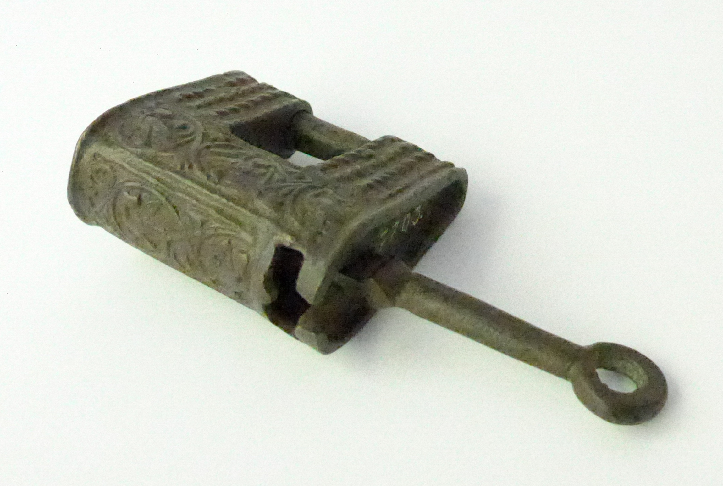 Mittelalterliches Vorhängeschloss mit Spreizfedersperre. Mit Schiebeschlüssel. Bronze, 12.-14. Jhdt. Bremen, Focke-Museum, Inv. Nr. 07703